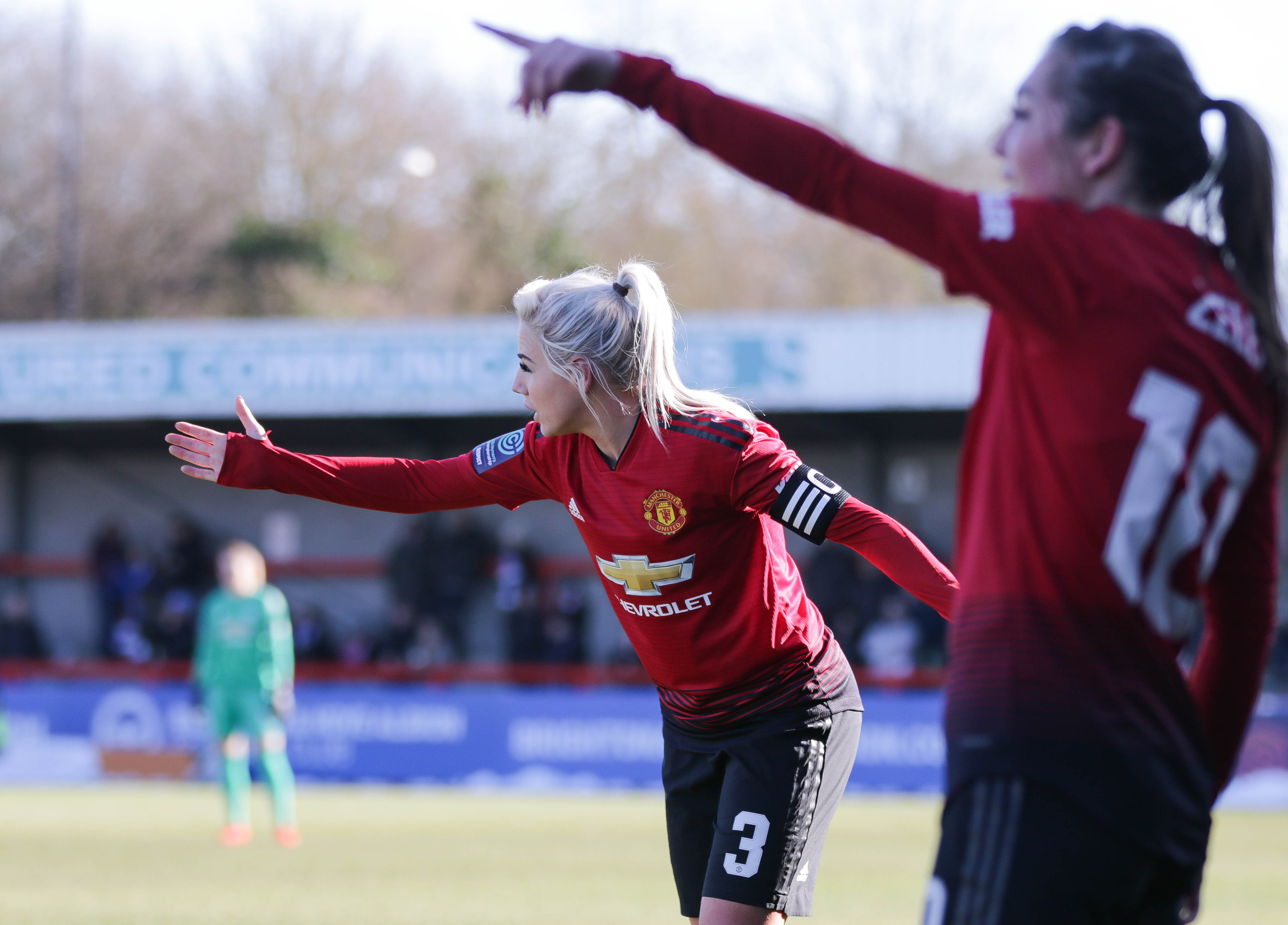 Alex Greenwood and Katie Zelem